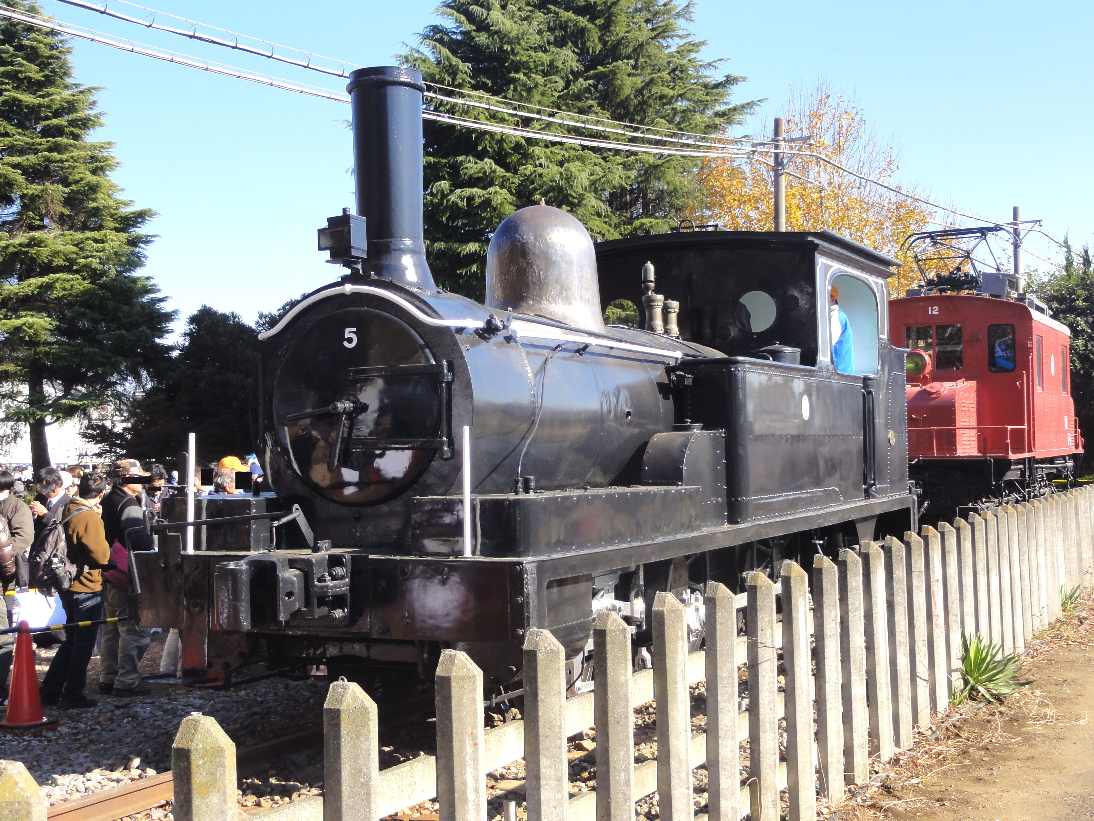 西武鉄道 5号蒸気機関車・西武鉄道E12（武蔵野鉄道デキカ10形電気機関車）